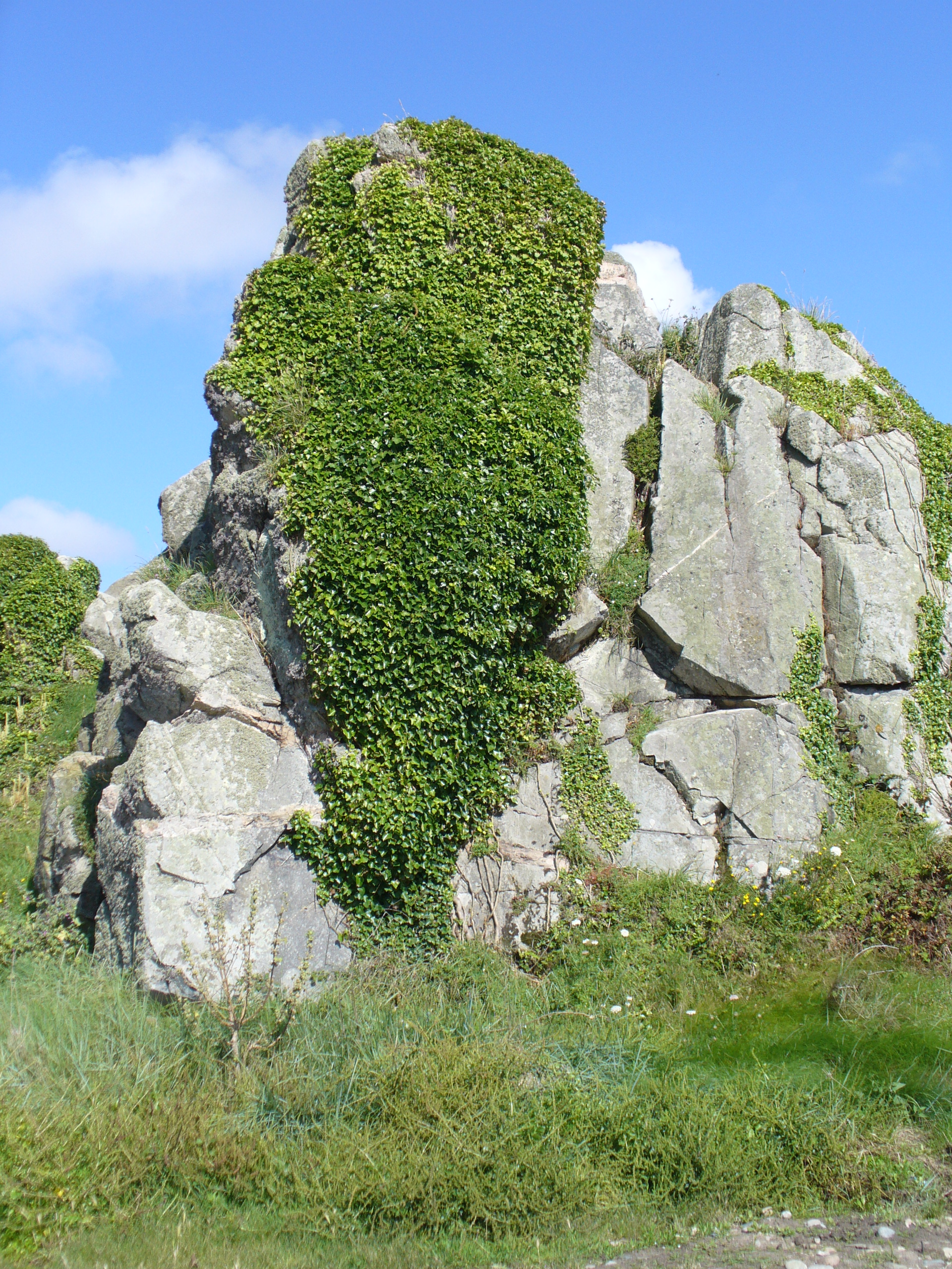 Das Felsenmeer rings um das Pointe du Château - Côte de Granit Rose (Côte de granit rose) - Rosa Granitküste - Commune Plougrescant, Departement Côtes-d'Armor, Region Bretagne - Spaziergang